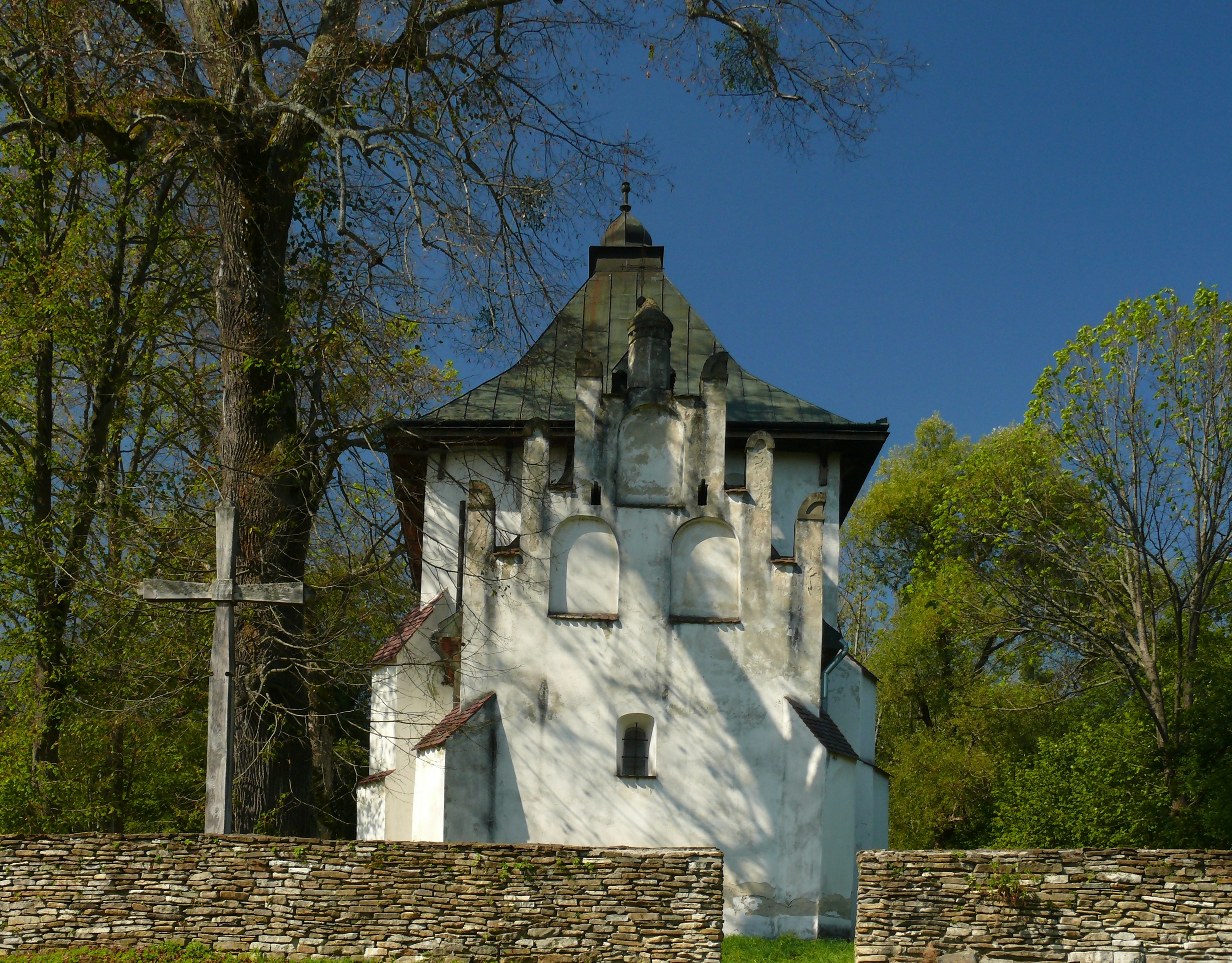 Najstarsza polska cerkiew obronna, pod wezwaniem św. Onufrego, znajdująca się w Posadzie Rybotykiej, woj. podkarpackie.